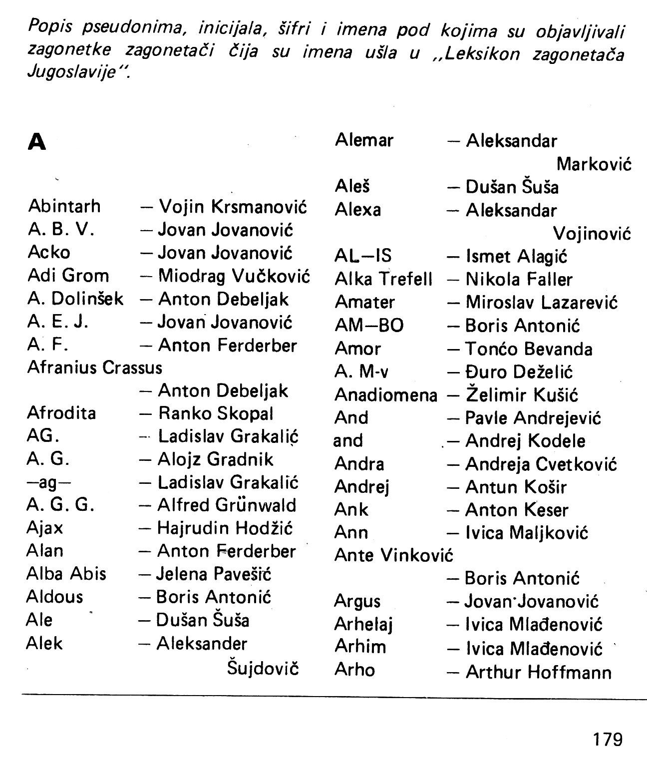 Leksikon zagonetača Jugoslavije, knjiga Stjepana Horvata